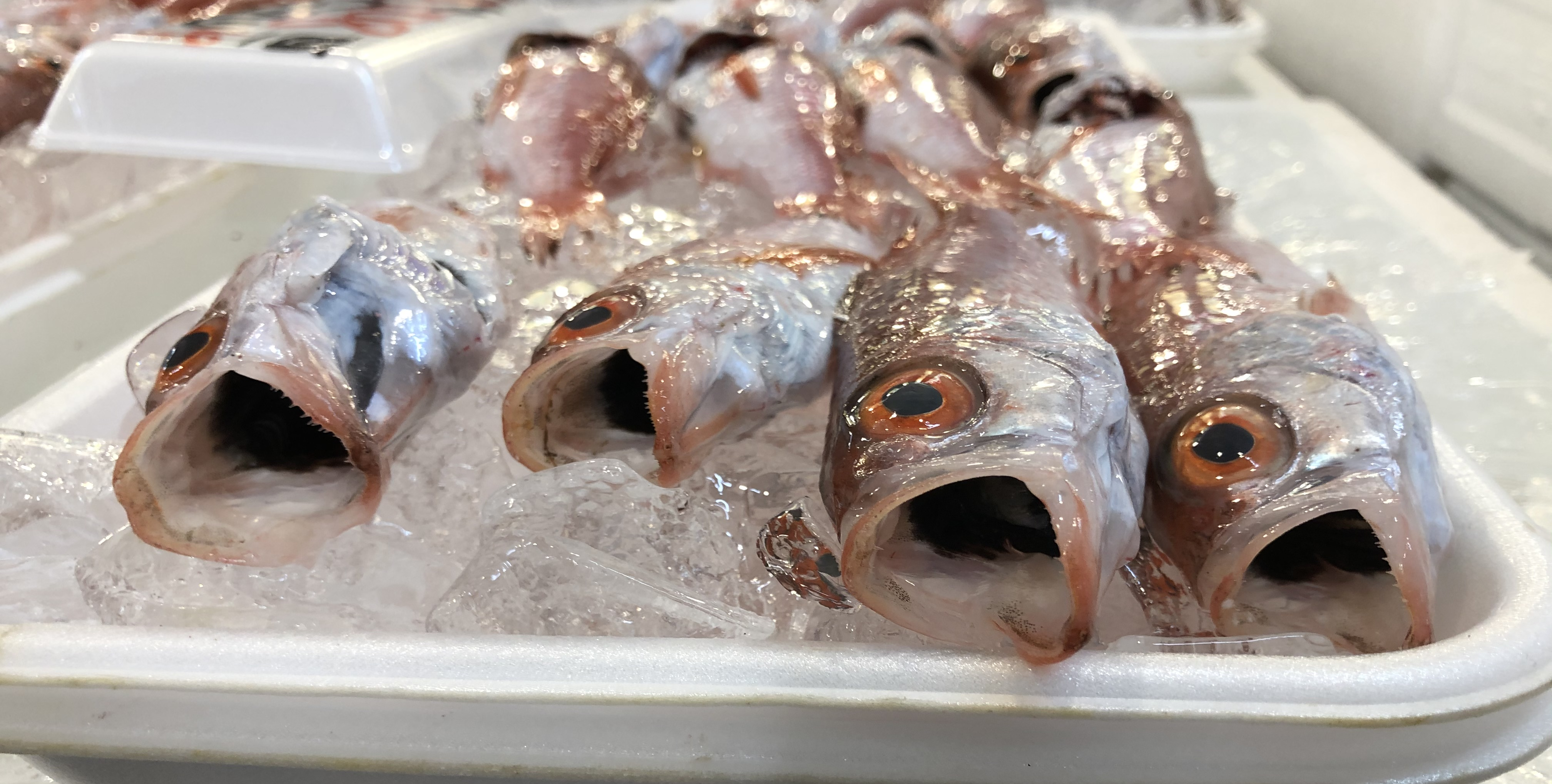 市場で売られるja:アカムツ。「ノドグロ」の由来となった黒い口内。